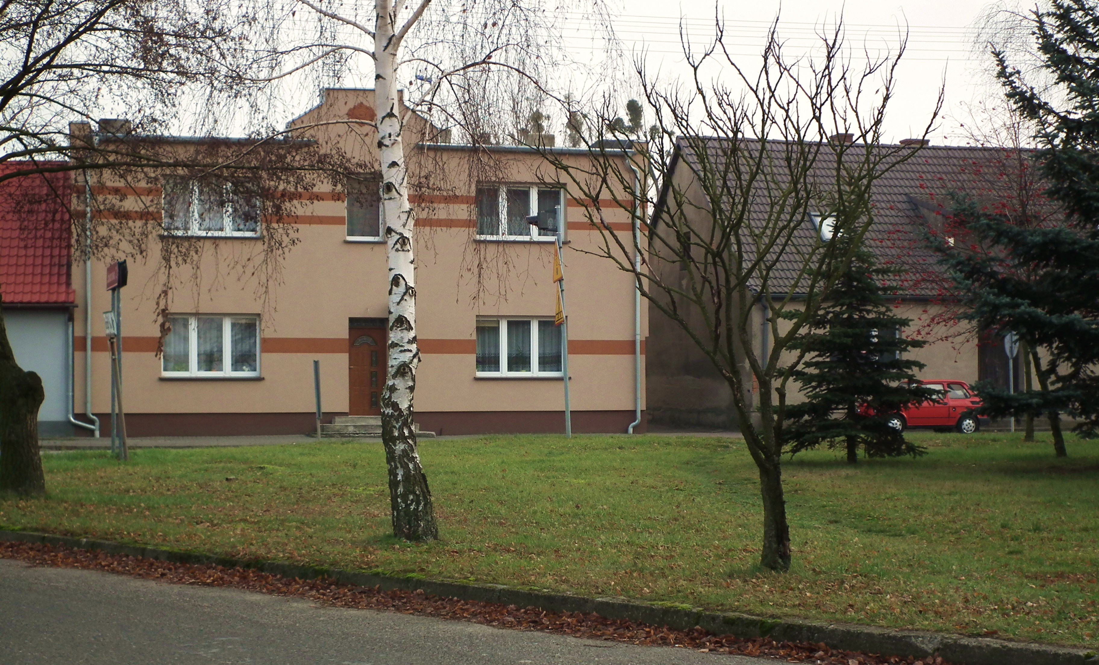 Rynek w Mielżynie.